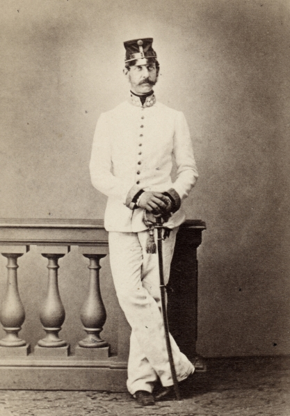 Alfred II. Windischgrätz (1819–1876)